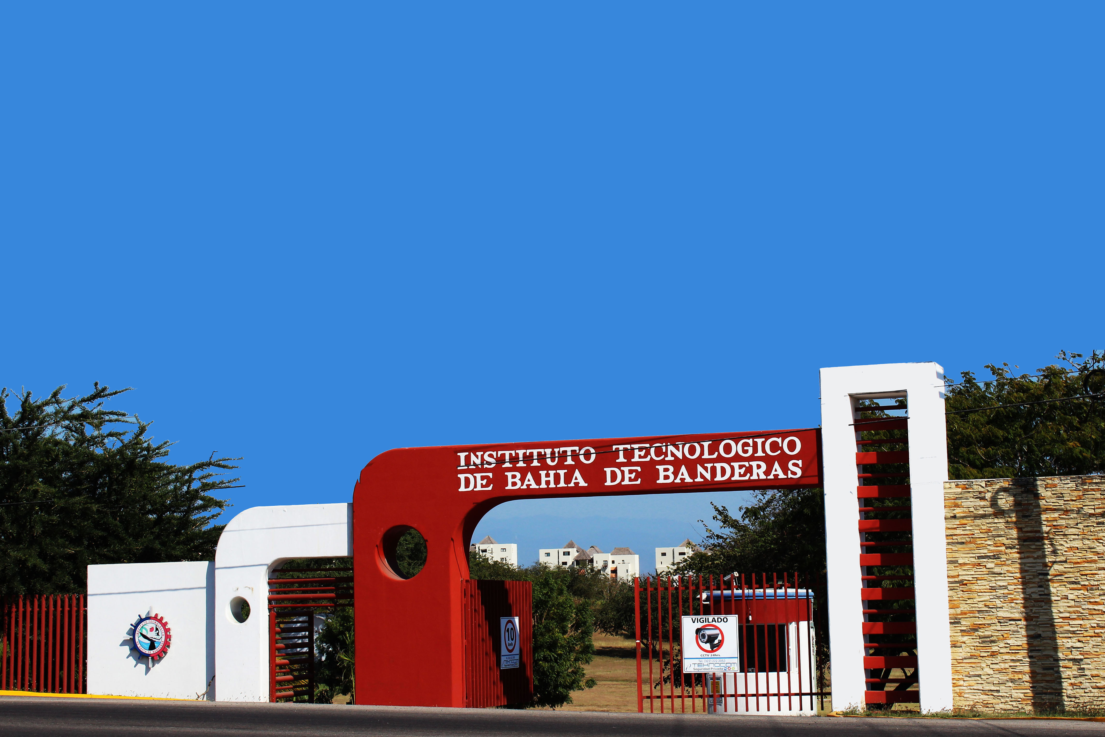 Segunda Entrada del Instituto Tecnológico de Bahía de Banderas